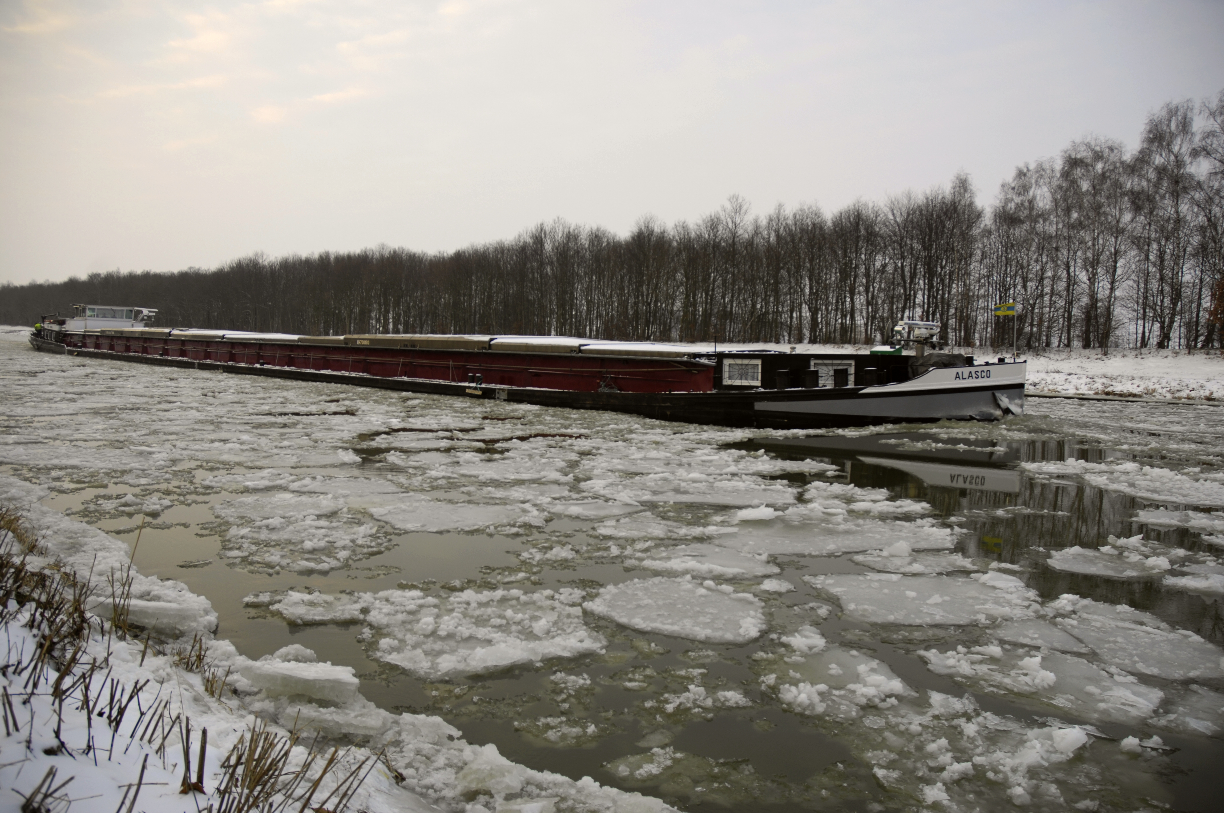 Lashorst, Mittellandkanal im Winter 2010